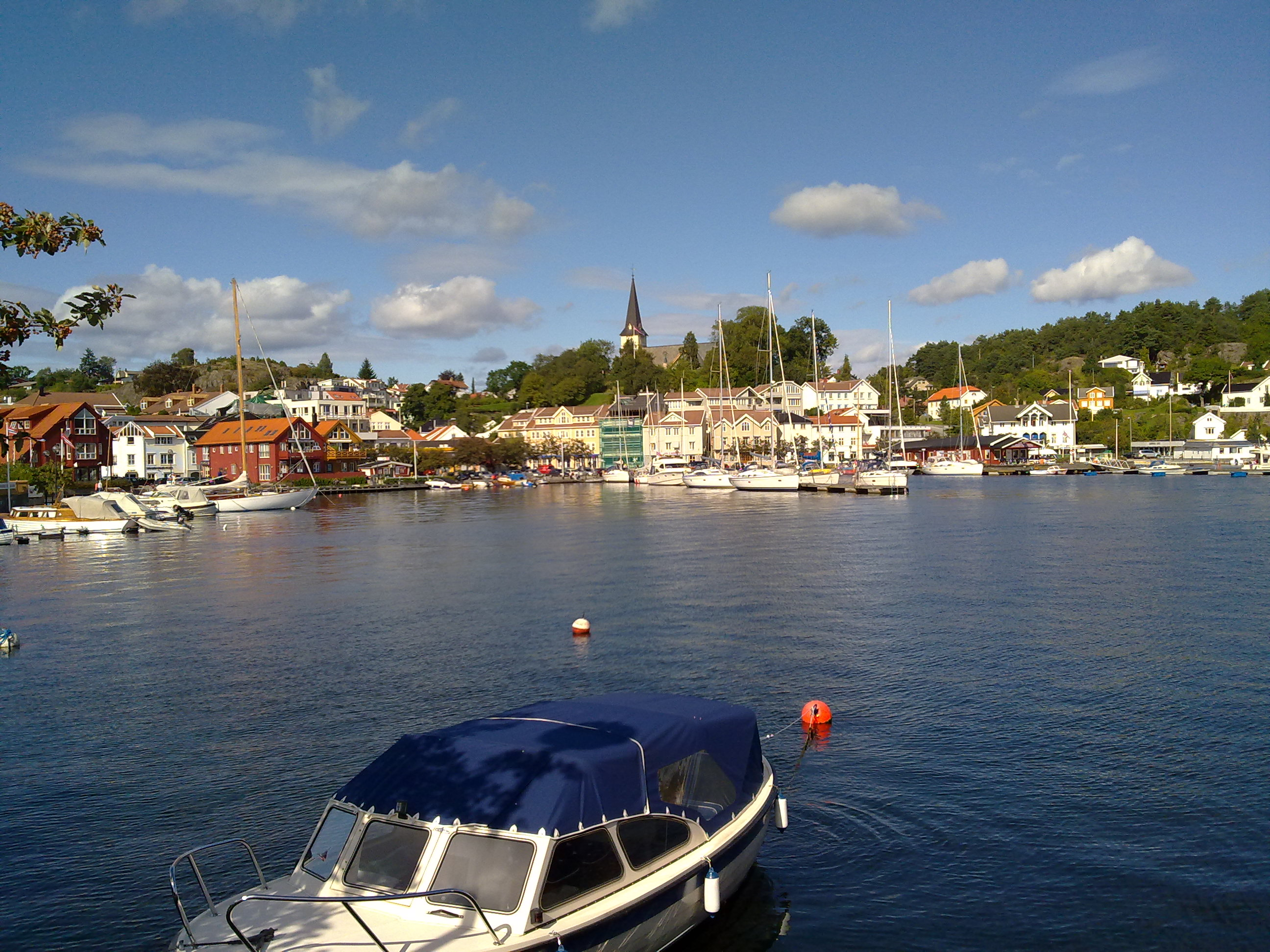 Grimstad